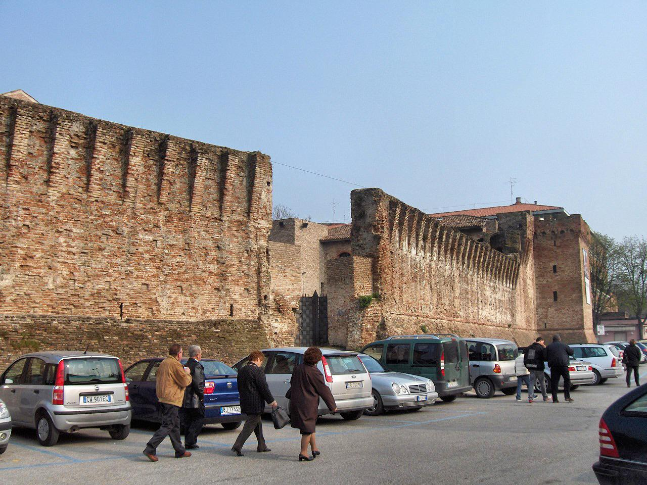 Rimini castle (Castel Sismondo) (1437-1446), Rimini, Italy